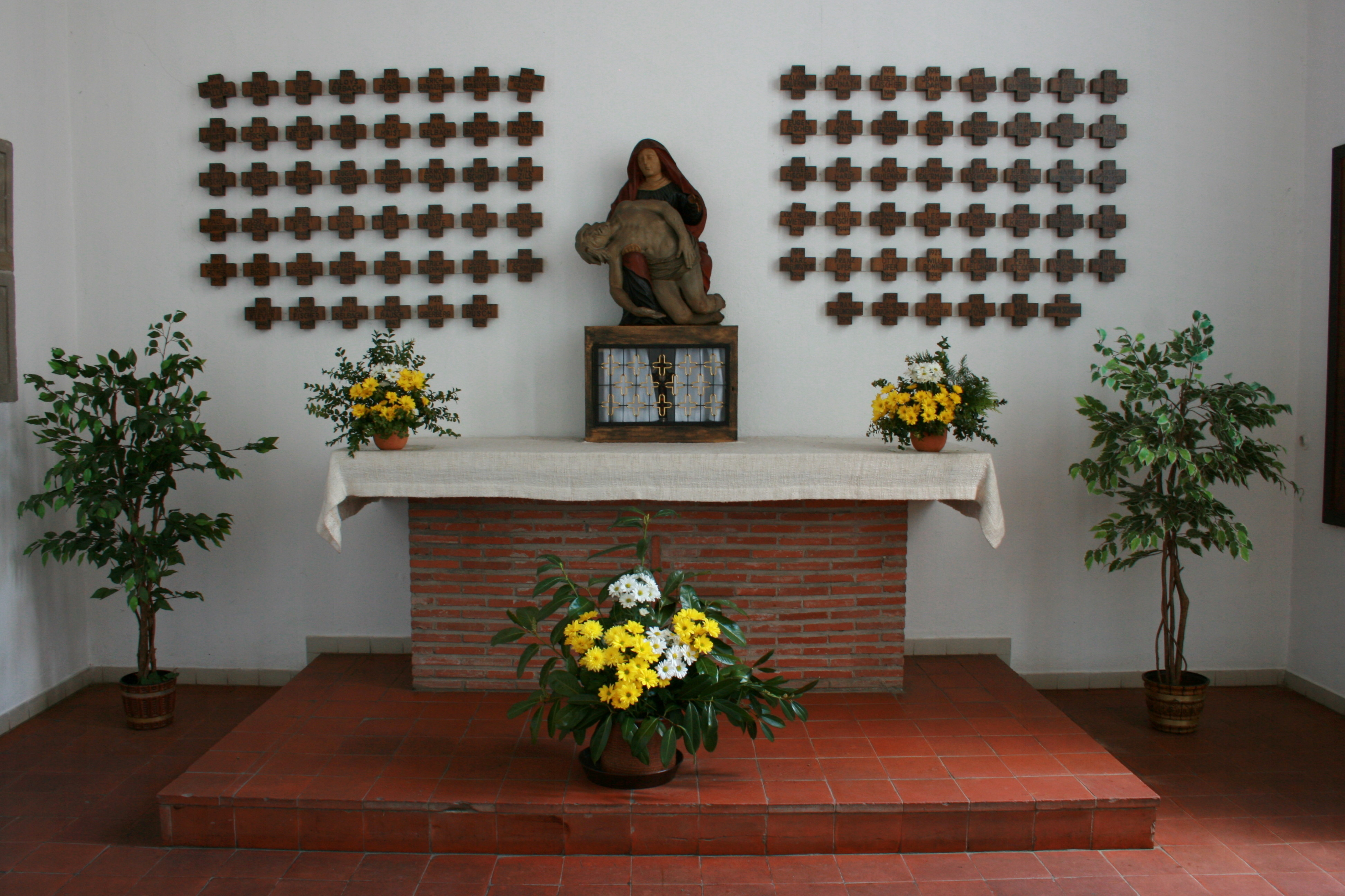 Sankt Apollinaris in Lindlar-Frielingsdorf